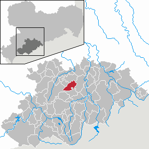 Thum im Erzgebirgskreis, Sachsen